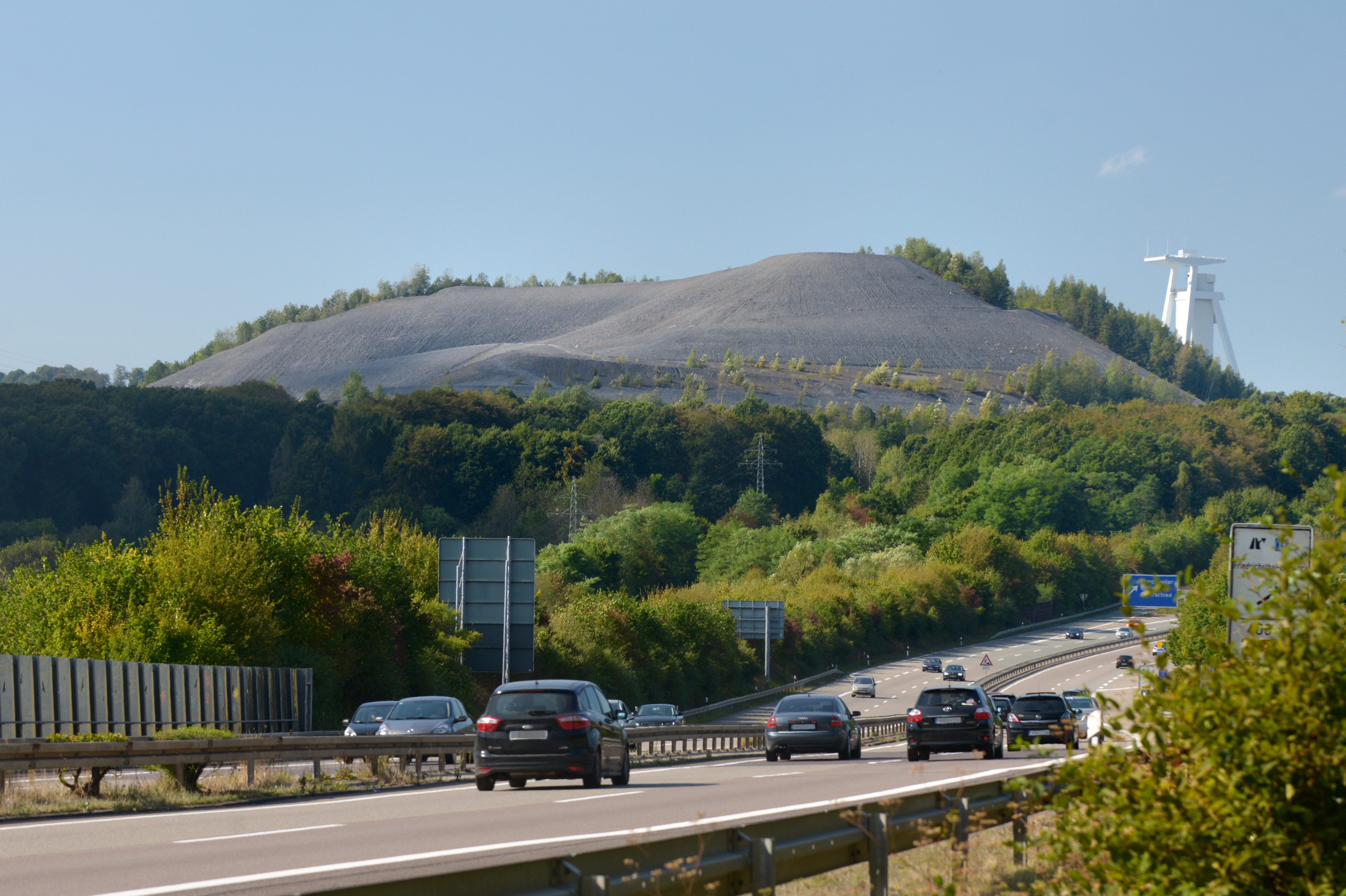 Bergehalde Göttelborn und Fördergerüst Schacht IV der ehemaligen Grube Göttelborn, Ortsteil von Quierschied, Saarland.